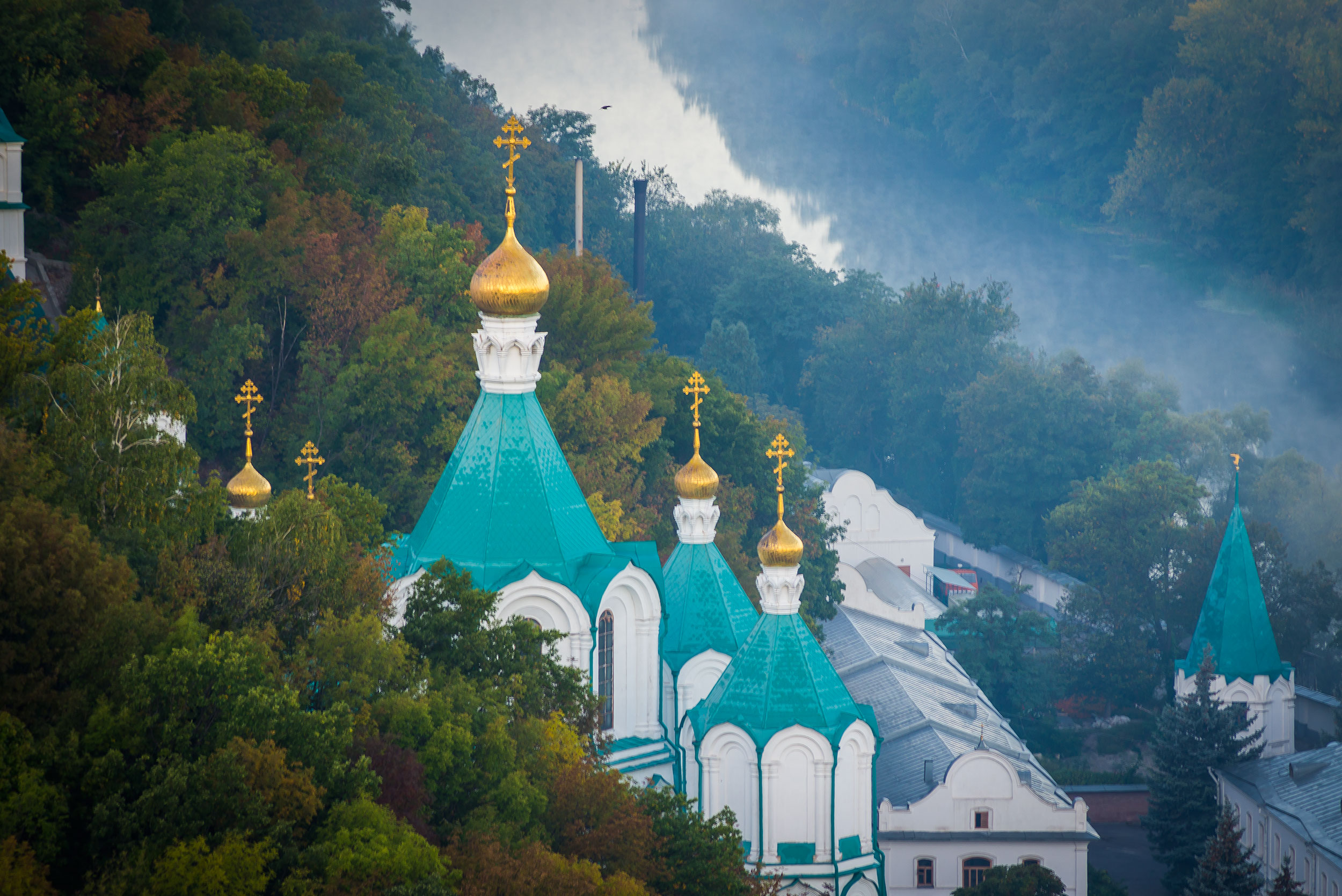 Успенський собор, Святогірськ, вул. Зарічна, 1